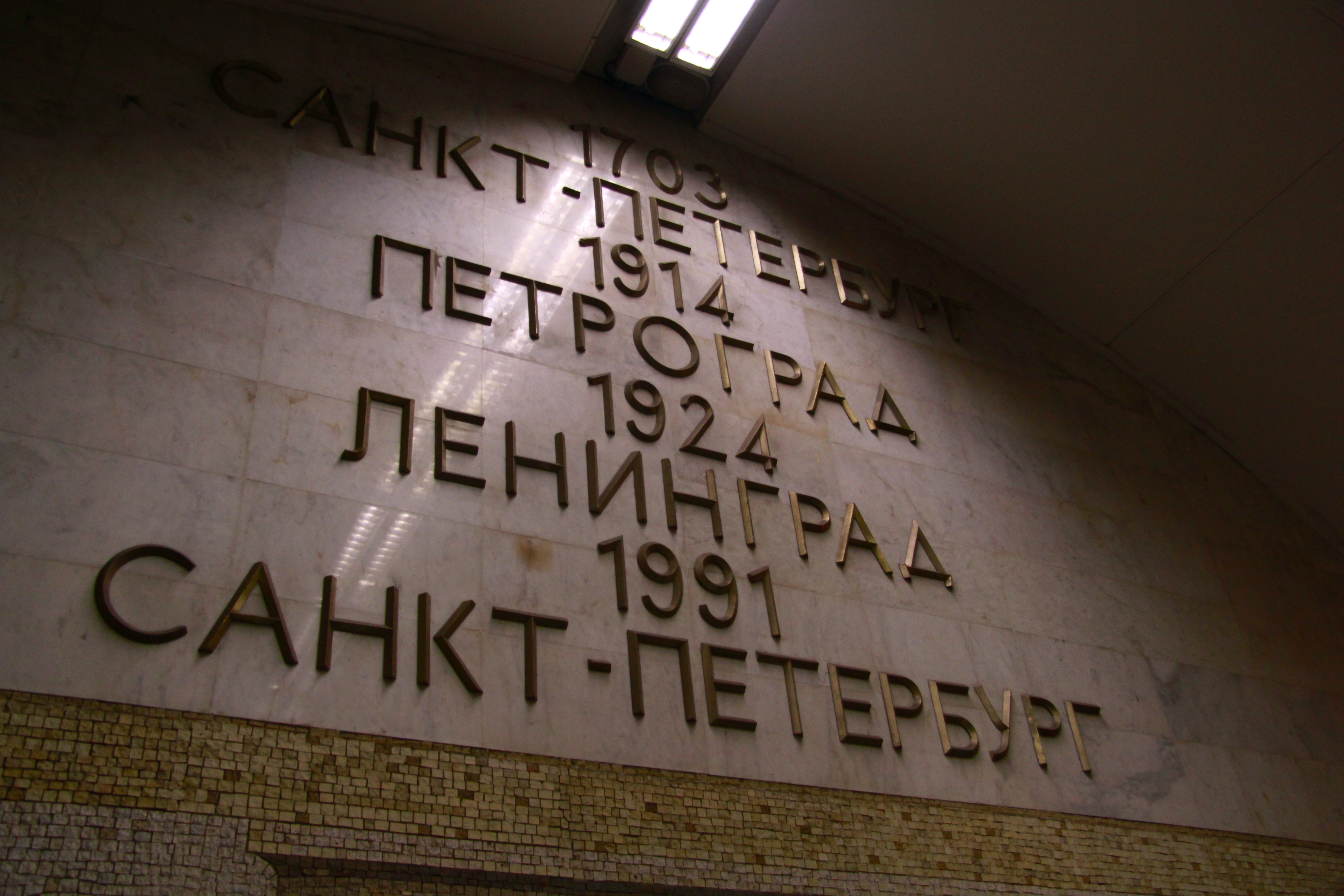 St. Petersburg Metro (Петербургский метрополитен) Moskovsko-Petrogradskaya and Pravoberezhnaya Lines (Московско-Петроградская и Правобережная линии)